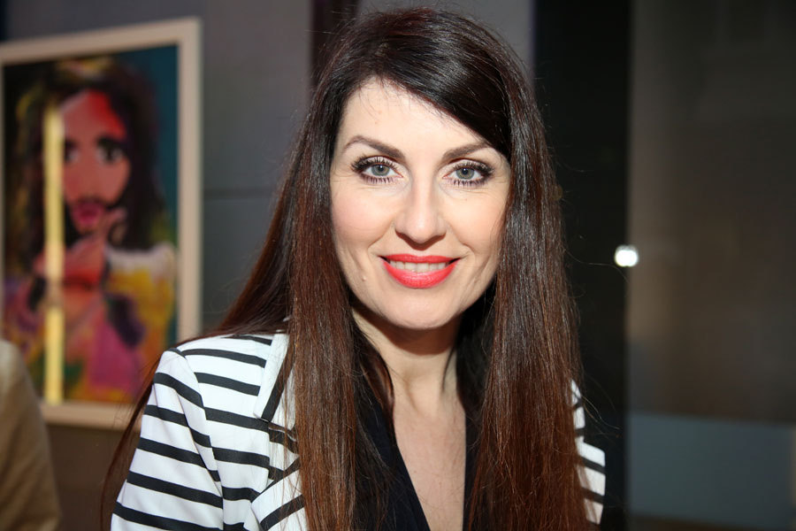 Ballwein.Monika-150401-5818